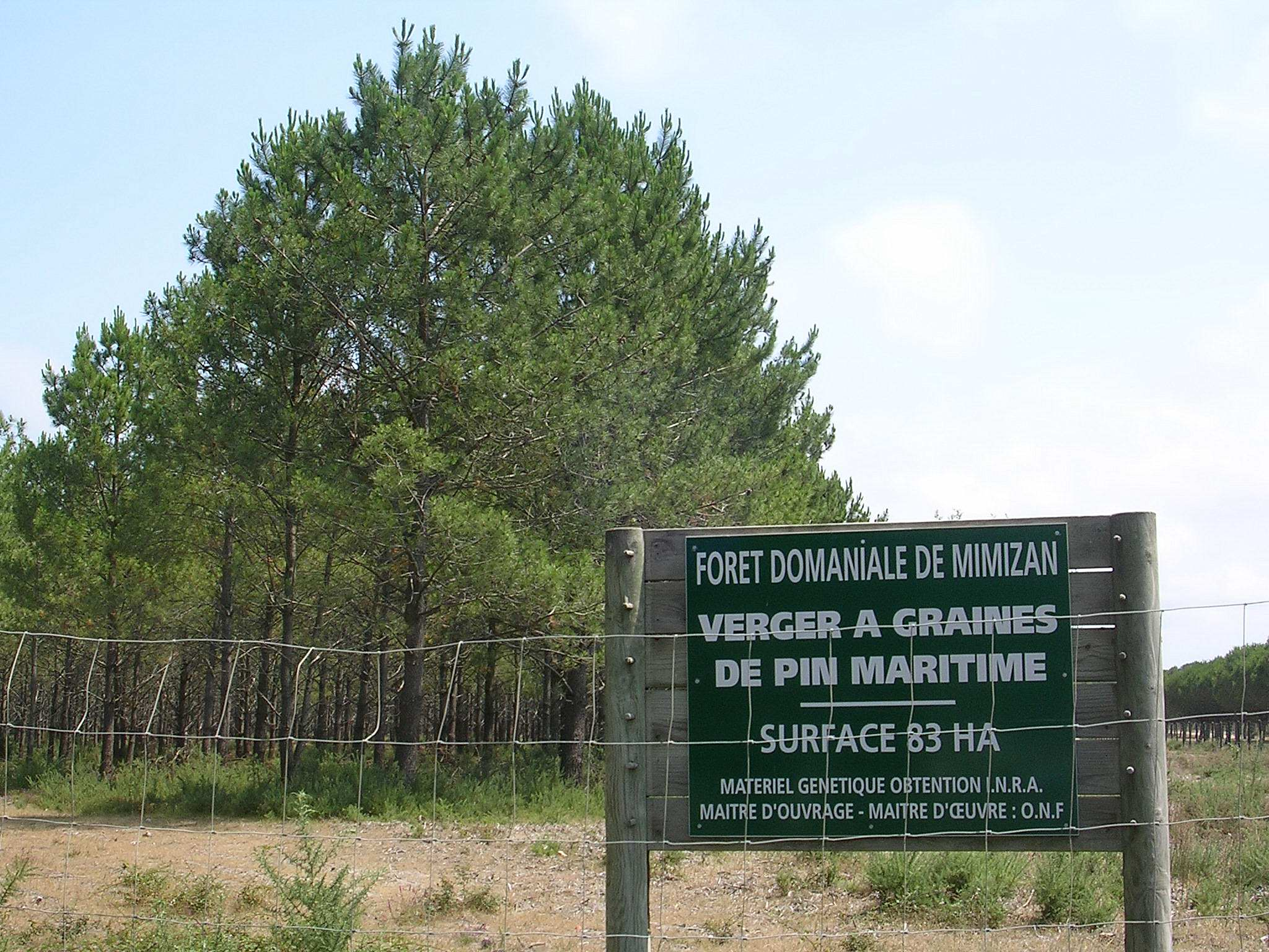 Verger à graines de la forêt domaniale de Mimizan-Plage, dans le département français des Landes.